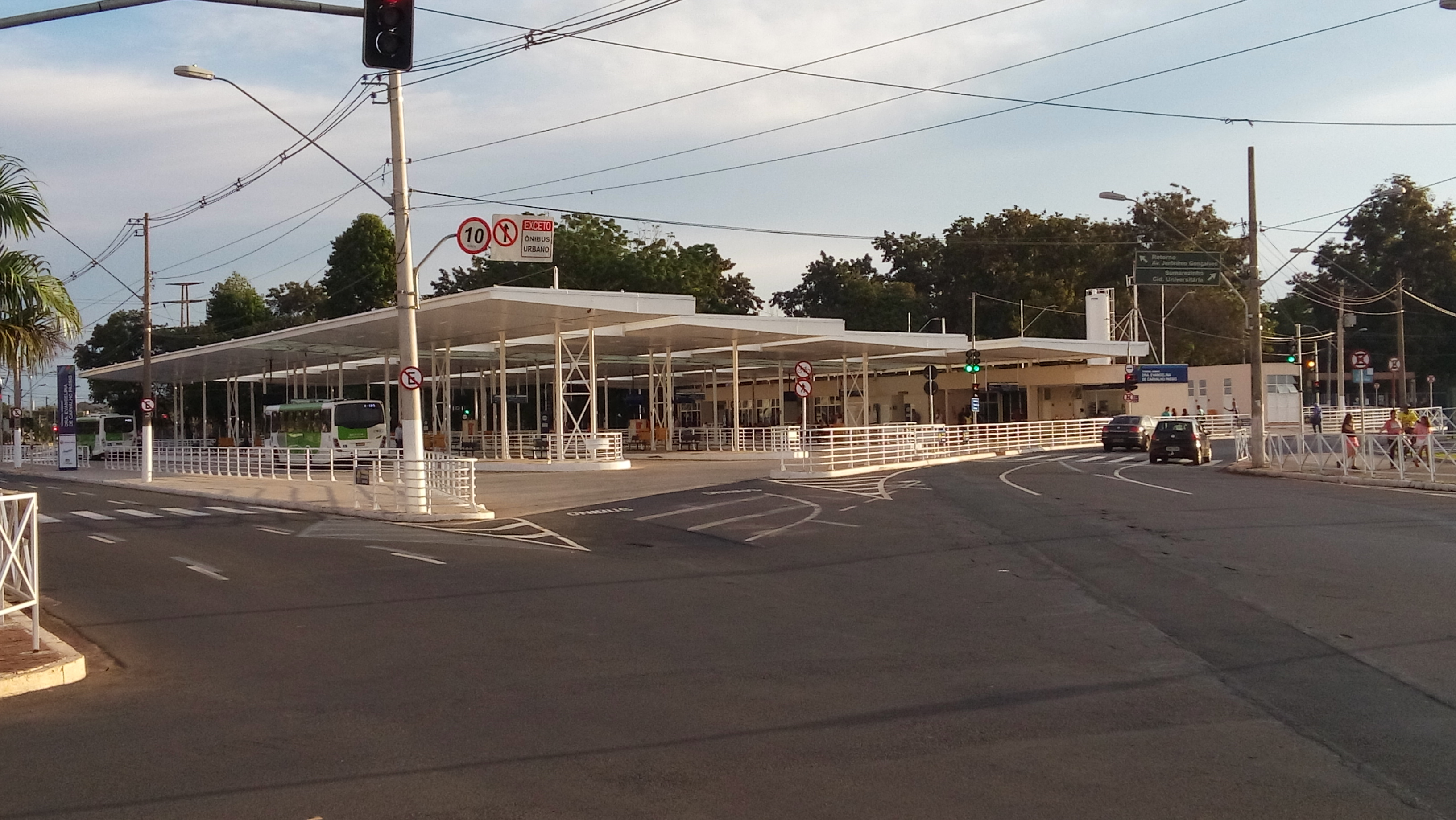 Terminal urbano de ônibus - Dra. Evangelina de Carvalho Passig - Ribeirão Preto / SP